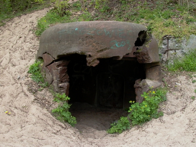 Grupa warowna "Ludendorff" / Werkgruppe "Ludendorff"